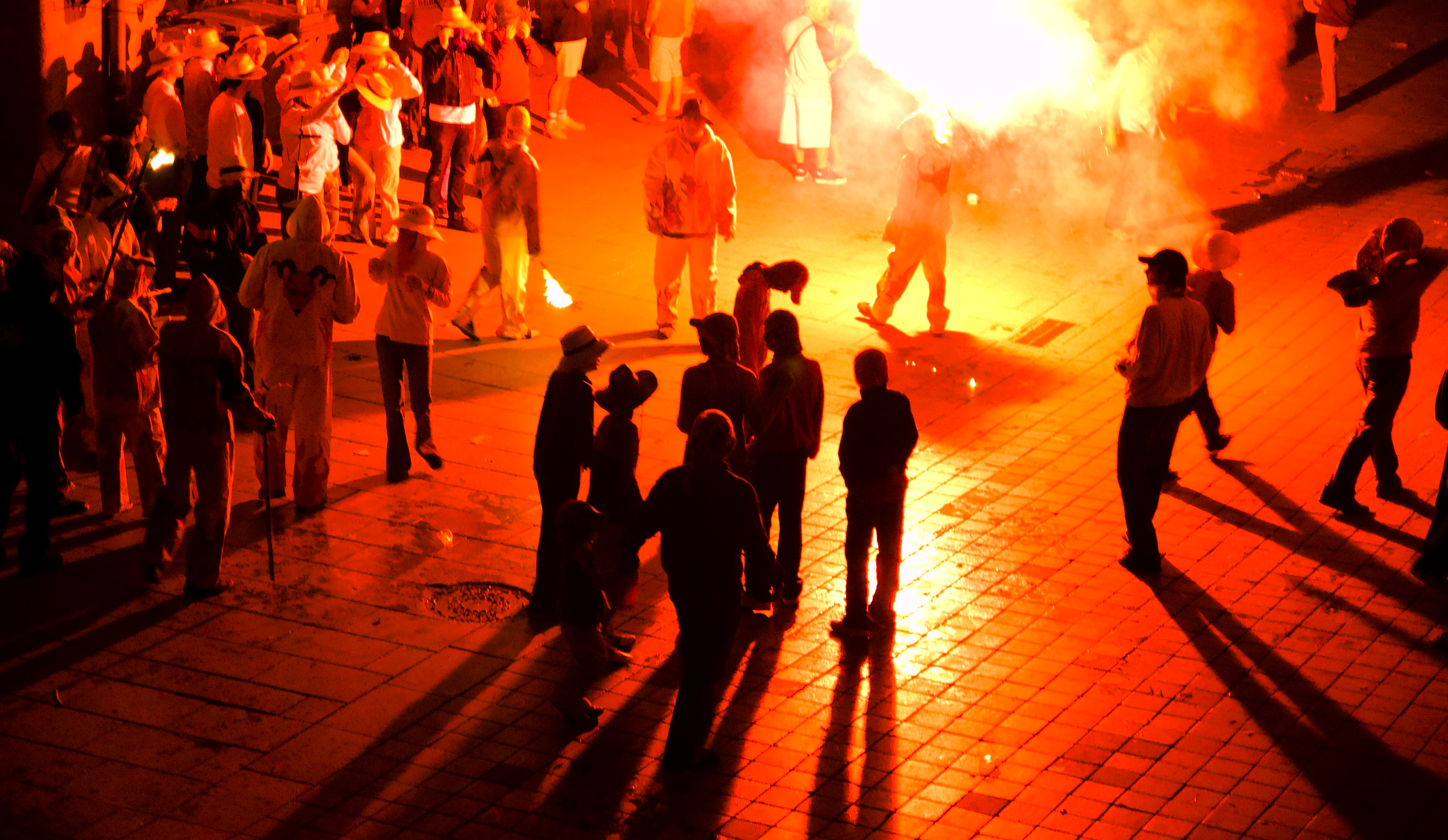 Correfocs de la Festa Major de Borges Blanques 2007